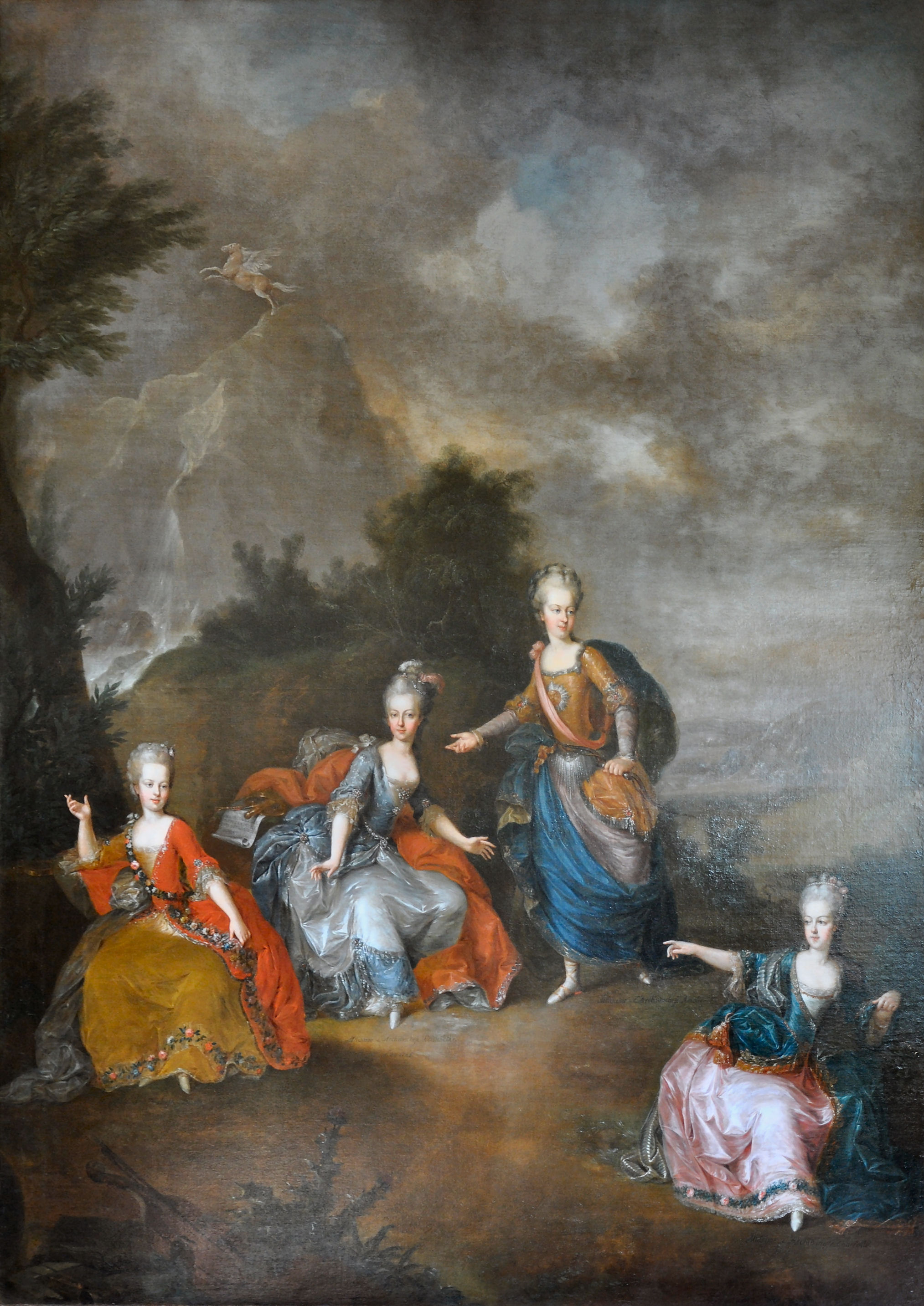 Représentation d'un opéra à Schoenbrunn, 24 janvier 1765